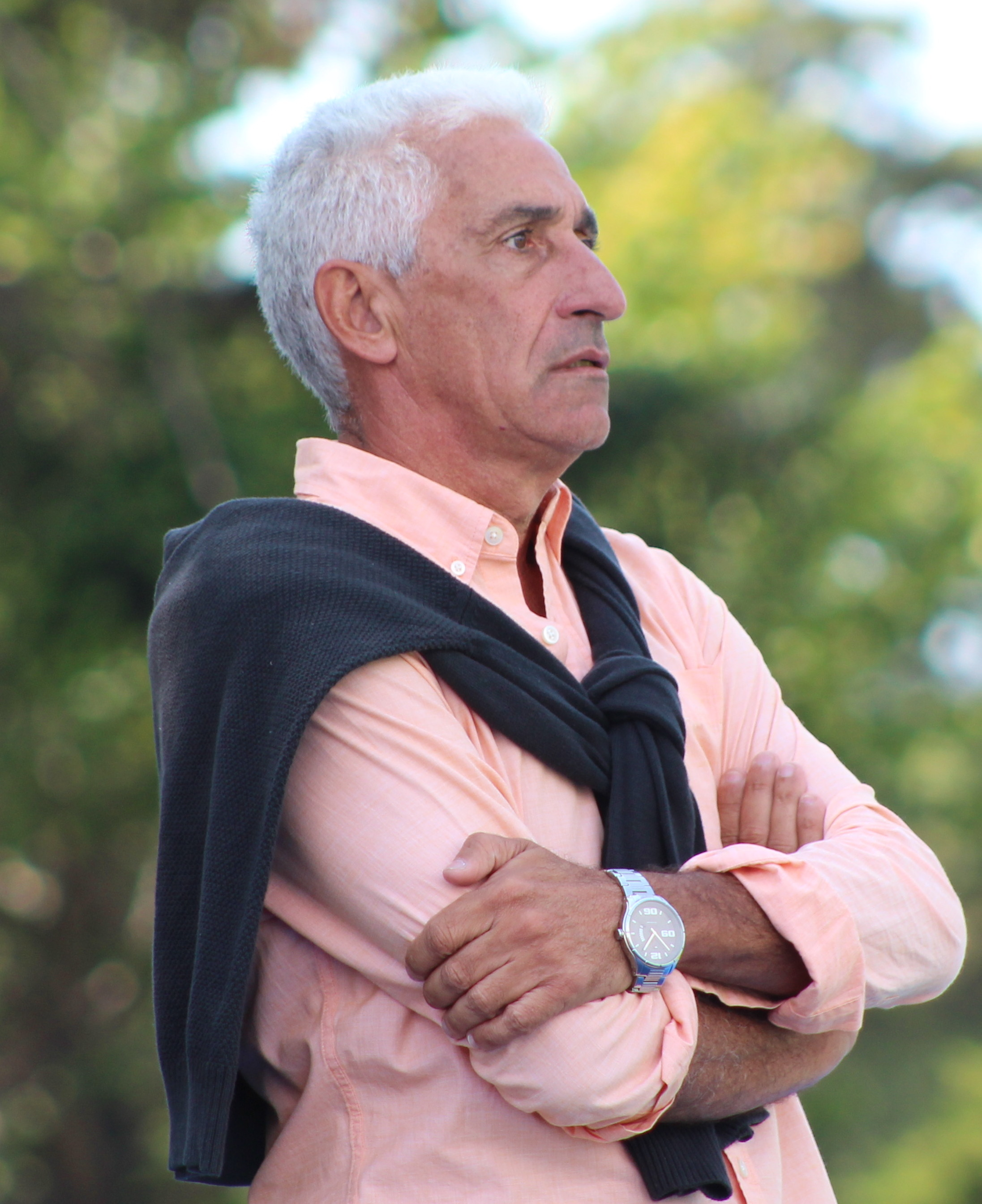 Marcelo Garrafo